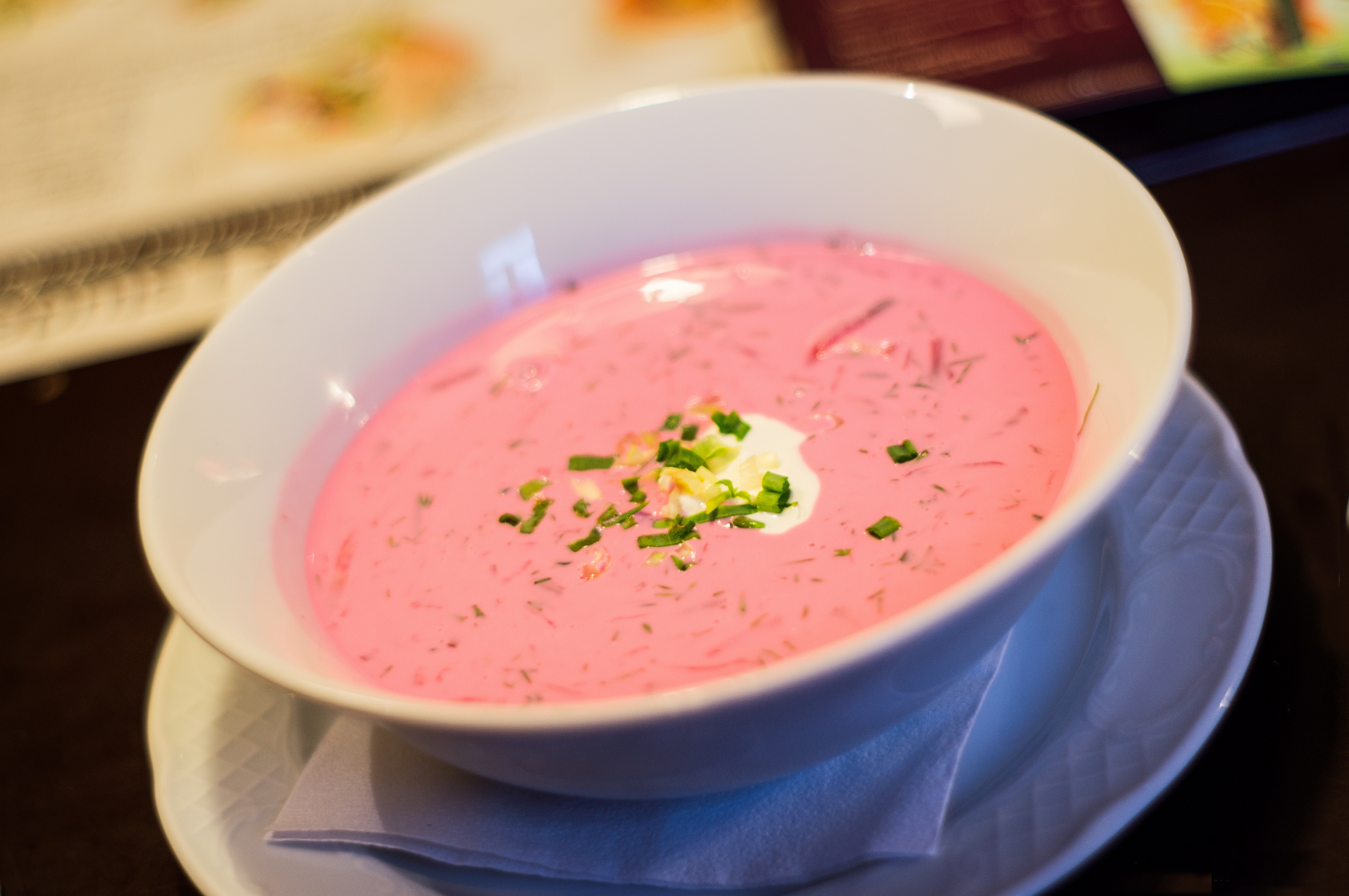 Traditional Lithuanian Pink soup Šaltibarščiai